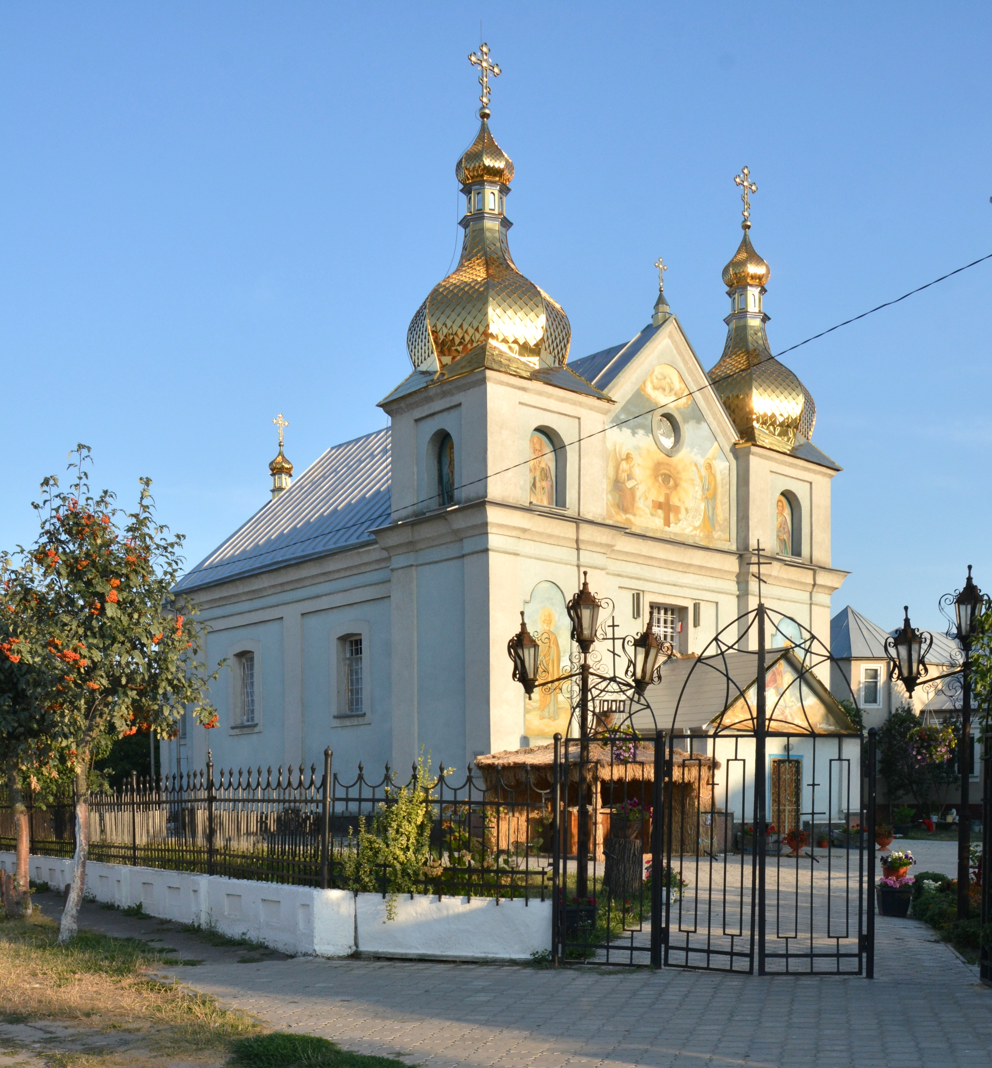 Георгіївська церква (мур.), Голоби, вул. Грушевського, 6